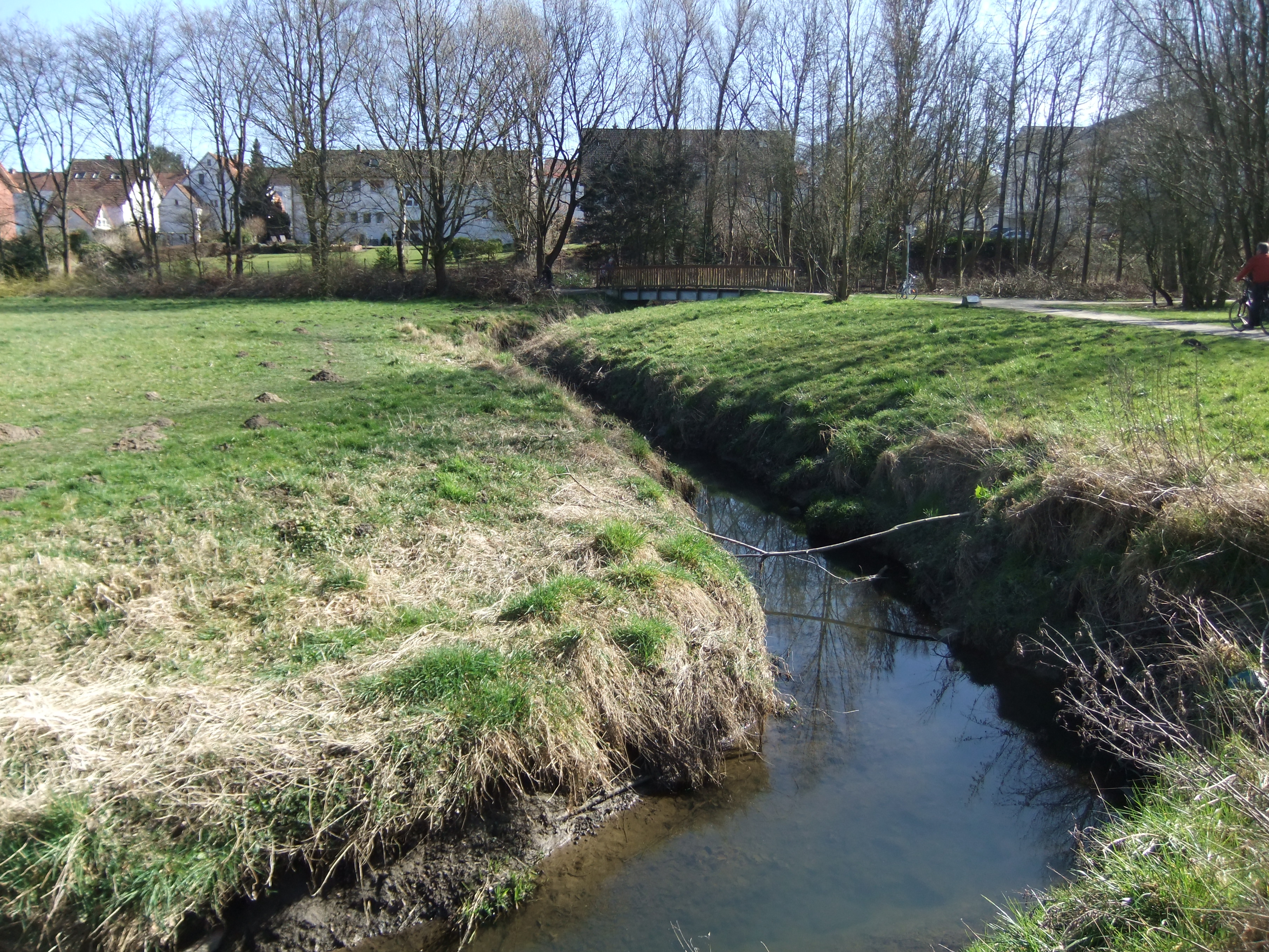 Schlsshofbach in Bielefeld.